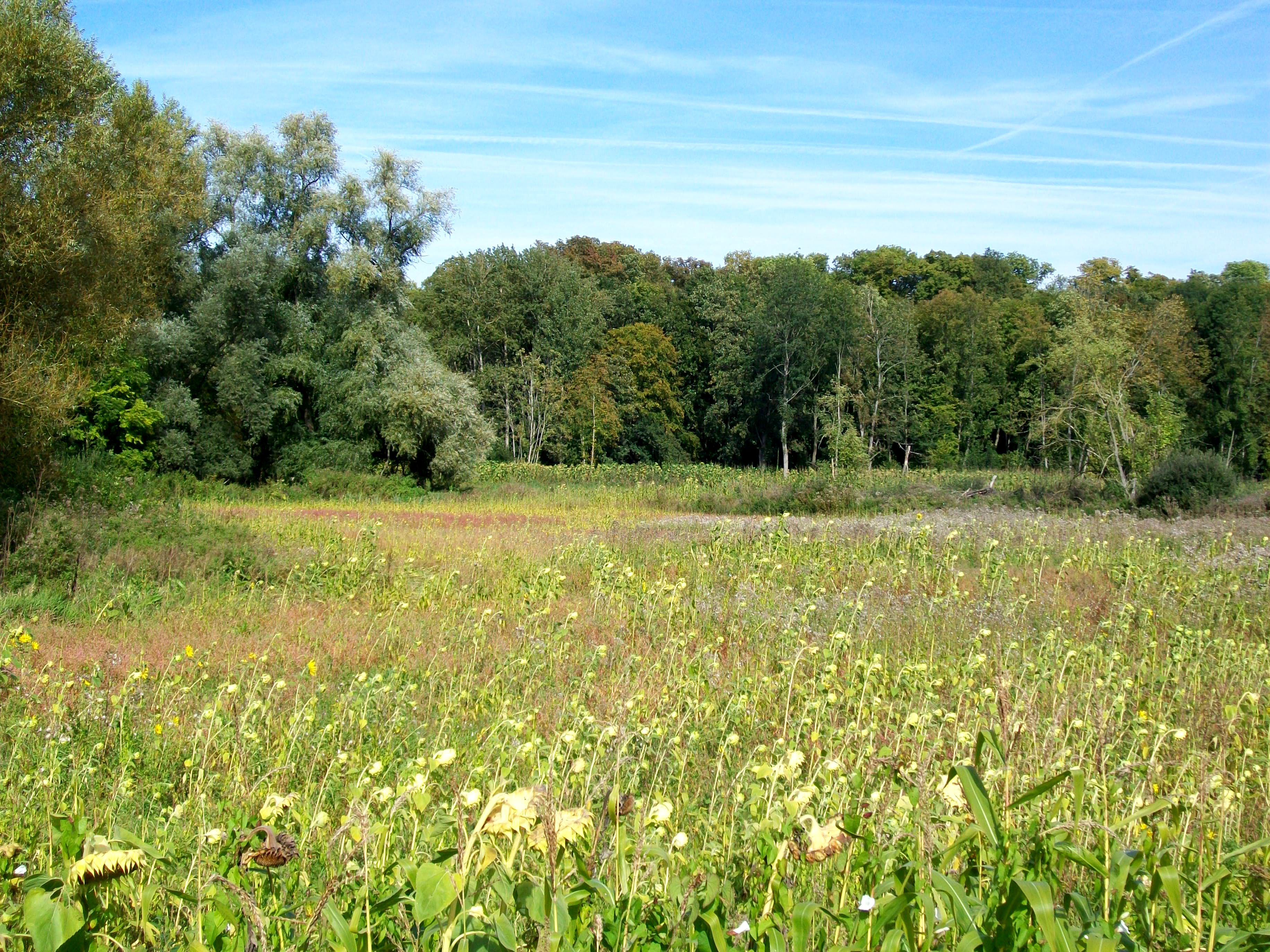 Le marais de la Bigue entre le faubourg Saint-Etienne et le hameau de Villemétrie.